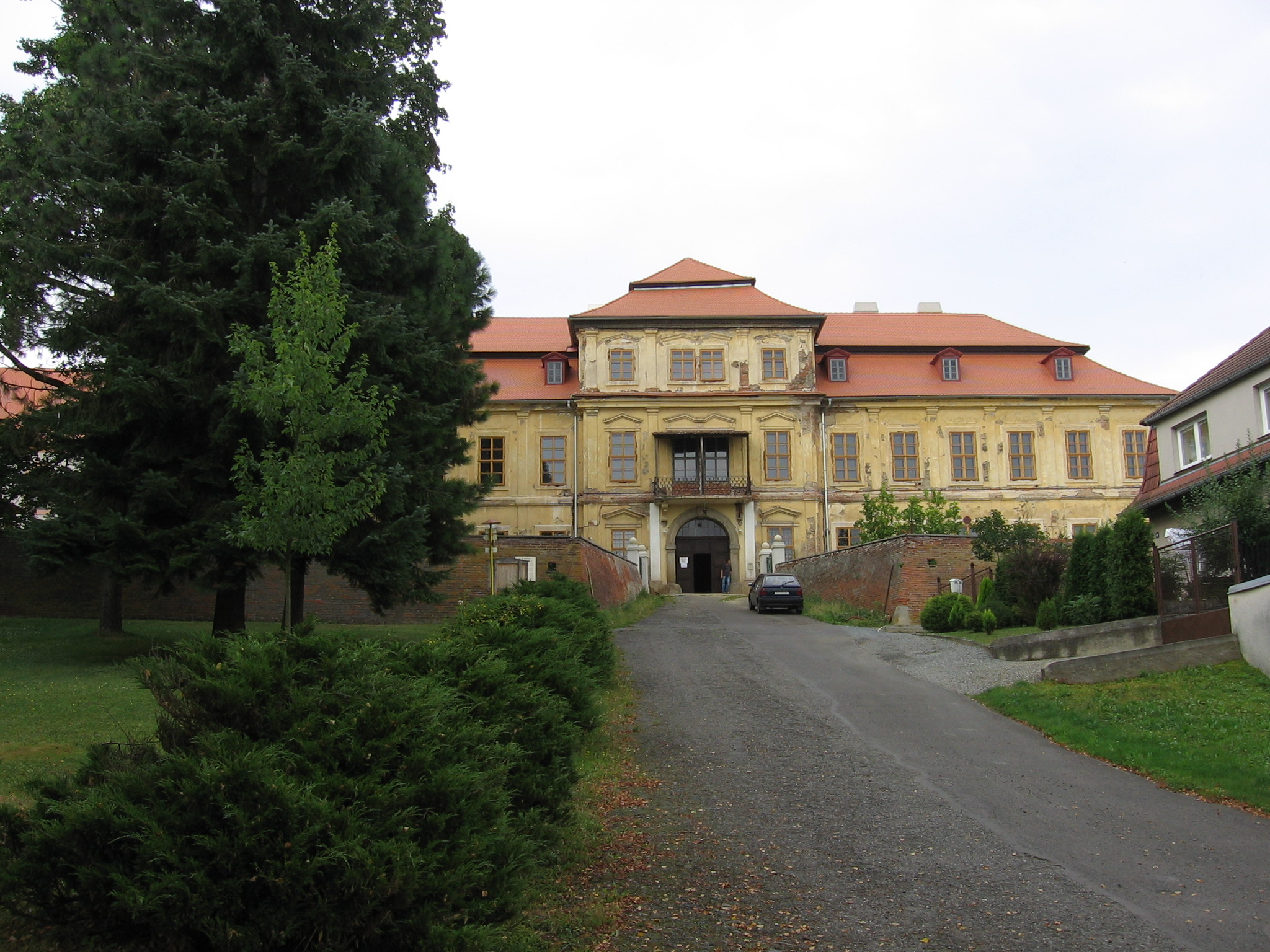 Zámek Svojšín, okr.Tachov